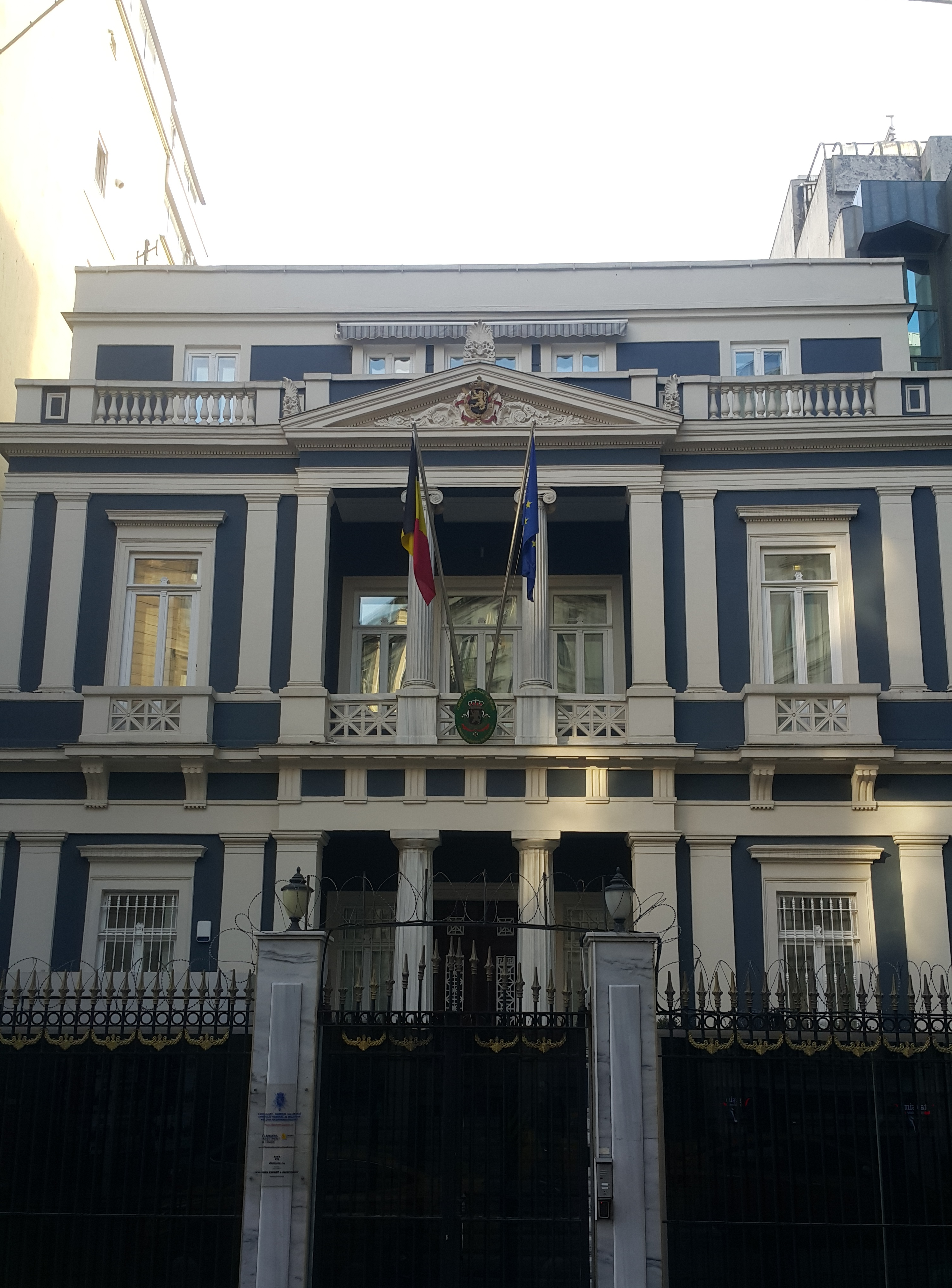 Belçika'nın İstanbul Başkonsolosluğu, Taksim, Türkiye.